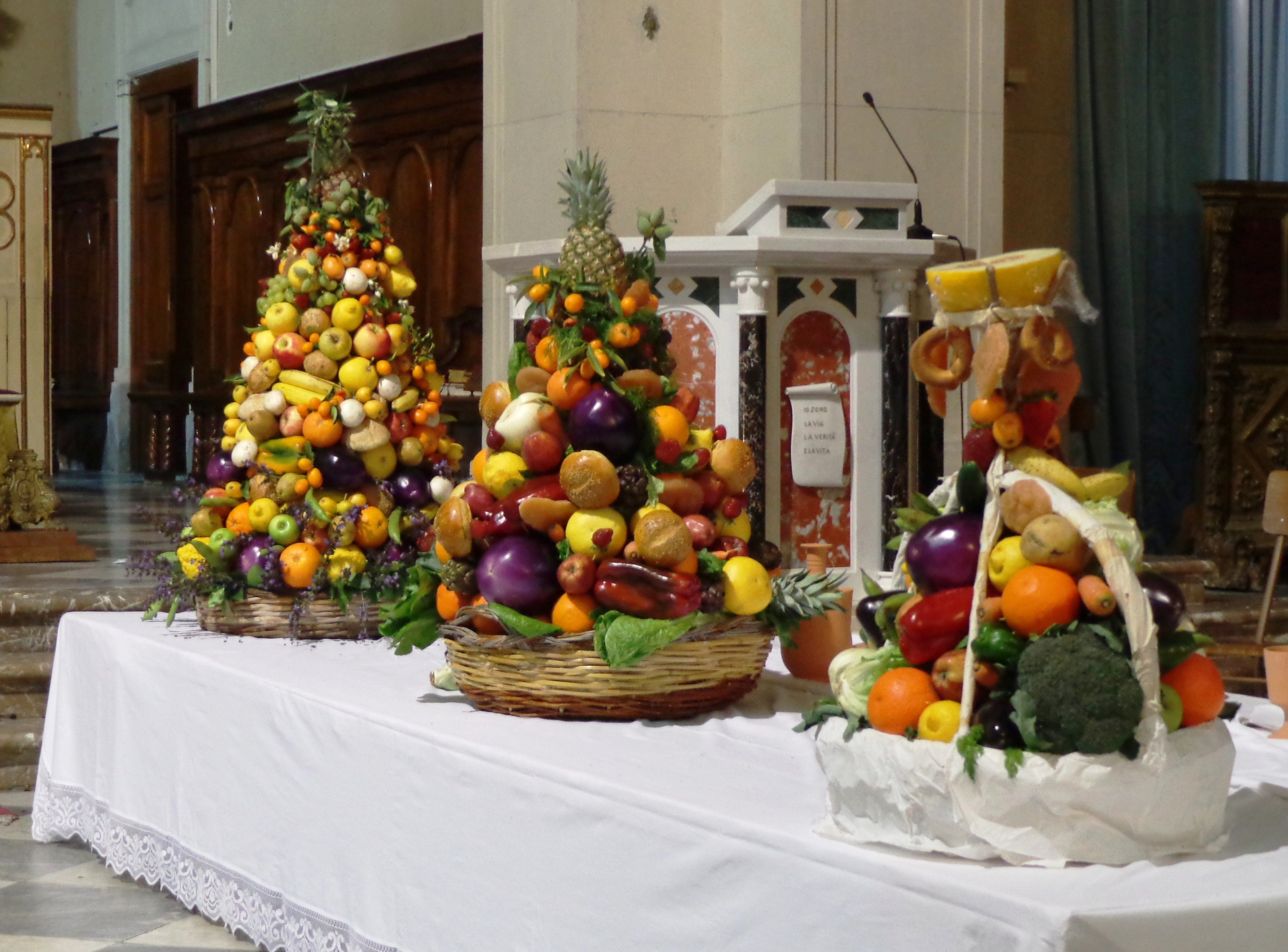 Canestro Pasquale